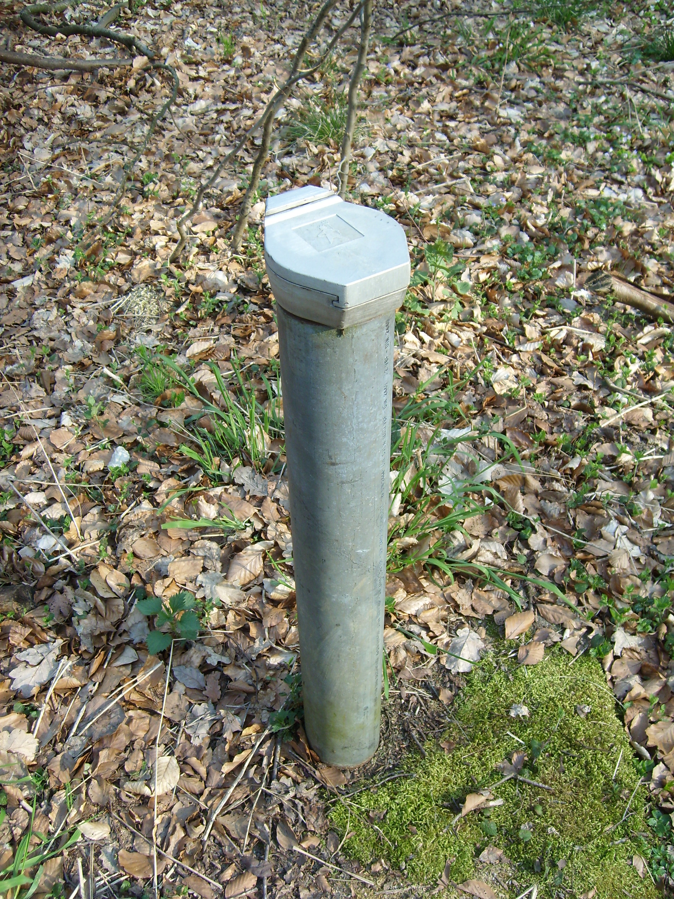 eine der Grundwassermessstellen im Breitenburger Gehölz nahe der Kochschen Kieskuhle